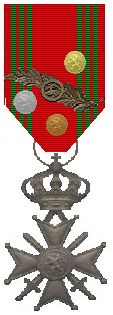 Oorlogskruis, Belgie